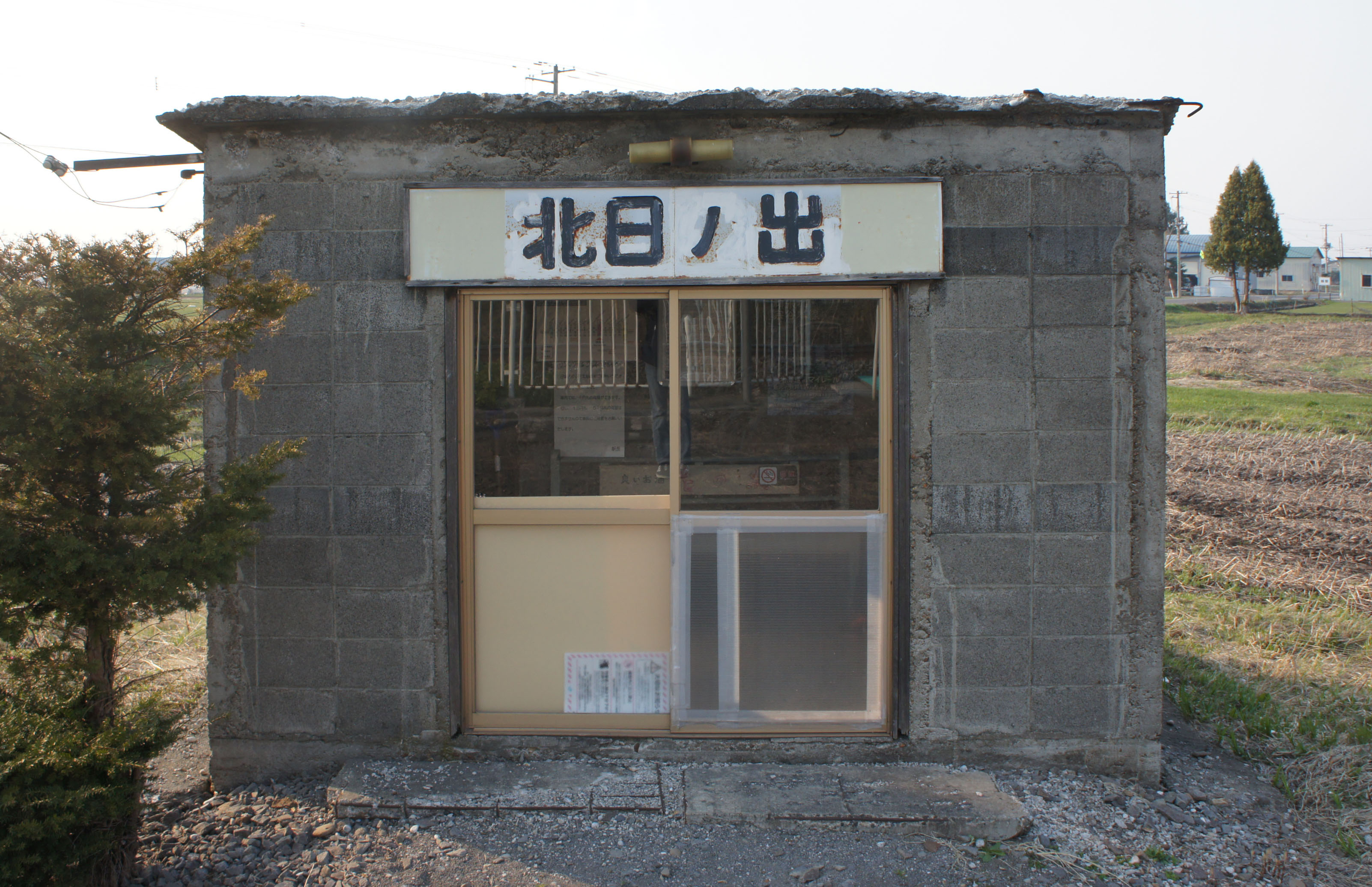 JR石北本線・北日ノ出駅の駅舎